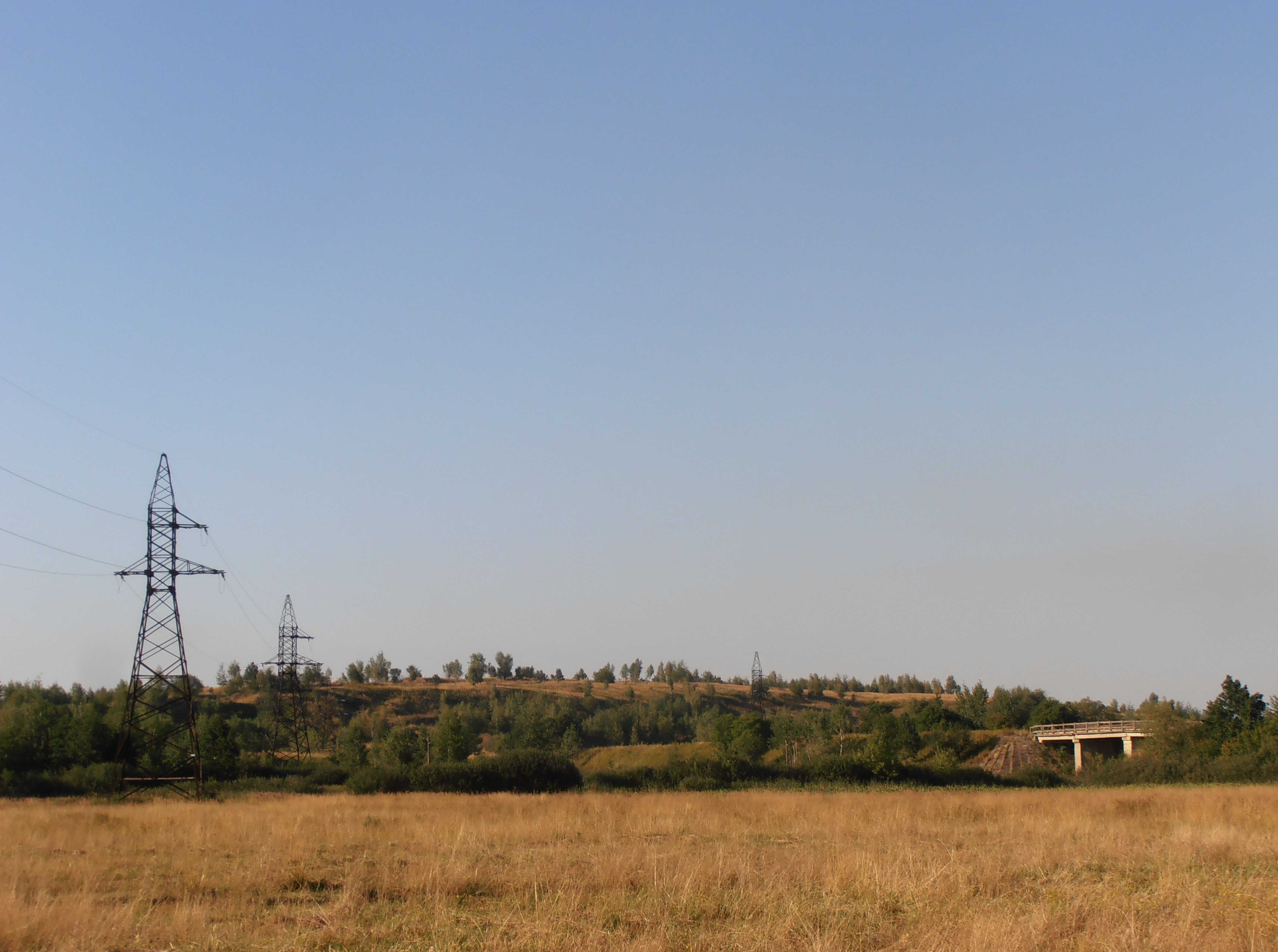 Кар'єр з траси М10